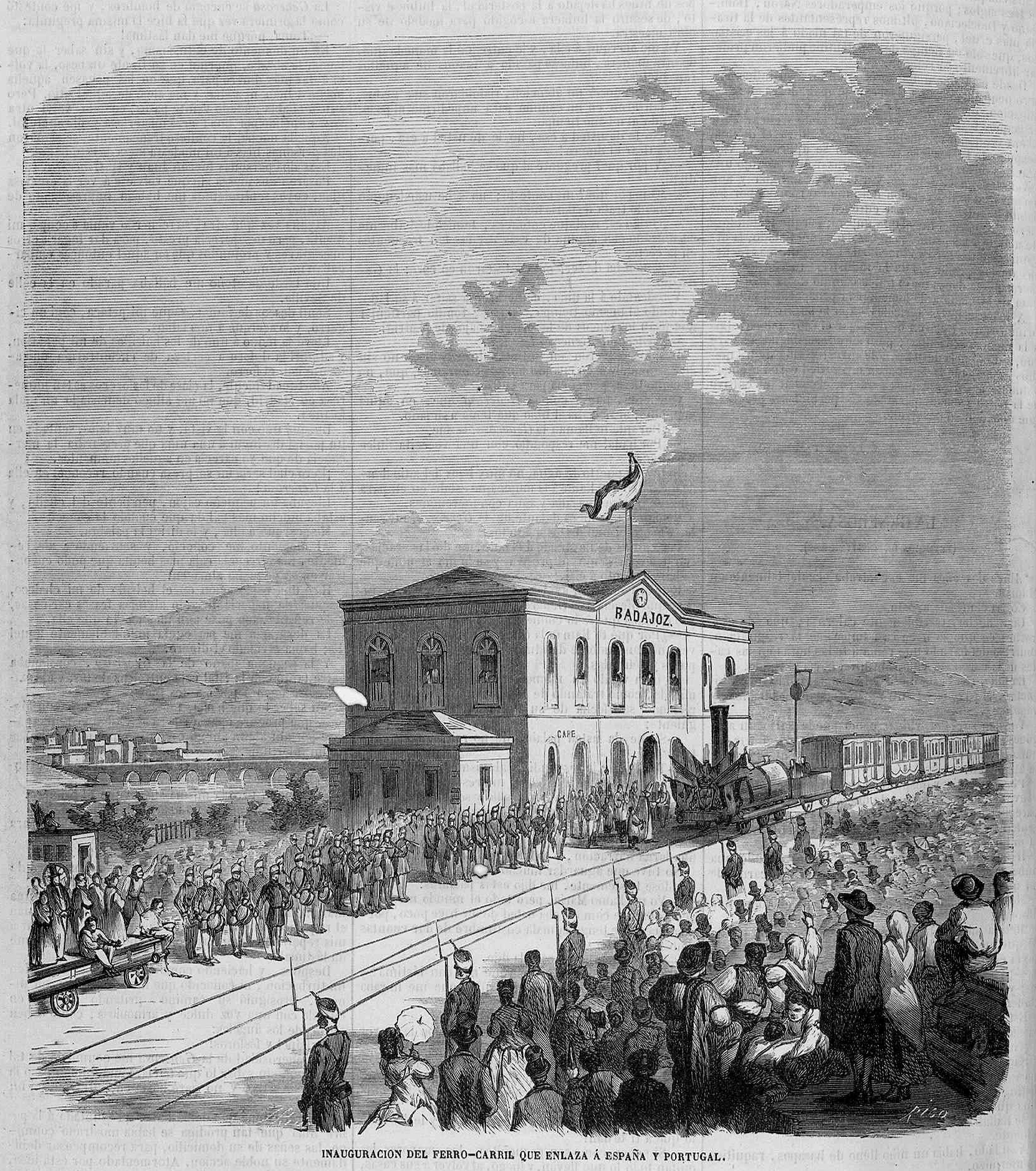 Inauguración del ferro-carril que enlaza á España y Portugal, en la revista española El Museo Universal.